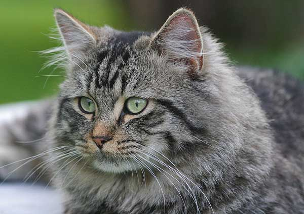 Deutsch Langhaar, Jungkater. Nachkomme der Linien von Fam. Aschemeier